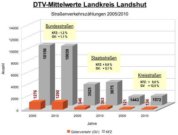 Darstellung der Verkehrsentwicklung für alle KFZ bzw. den Güterverkehr auf Bundes-, Staats- und Kreisstraße im Landkreis Landshut anhand der DTV-Mittelwerte aus den Verkehrszählungen 2005 und 2010